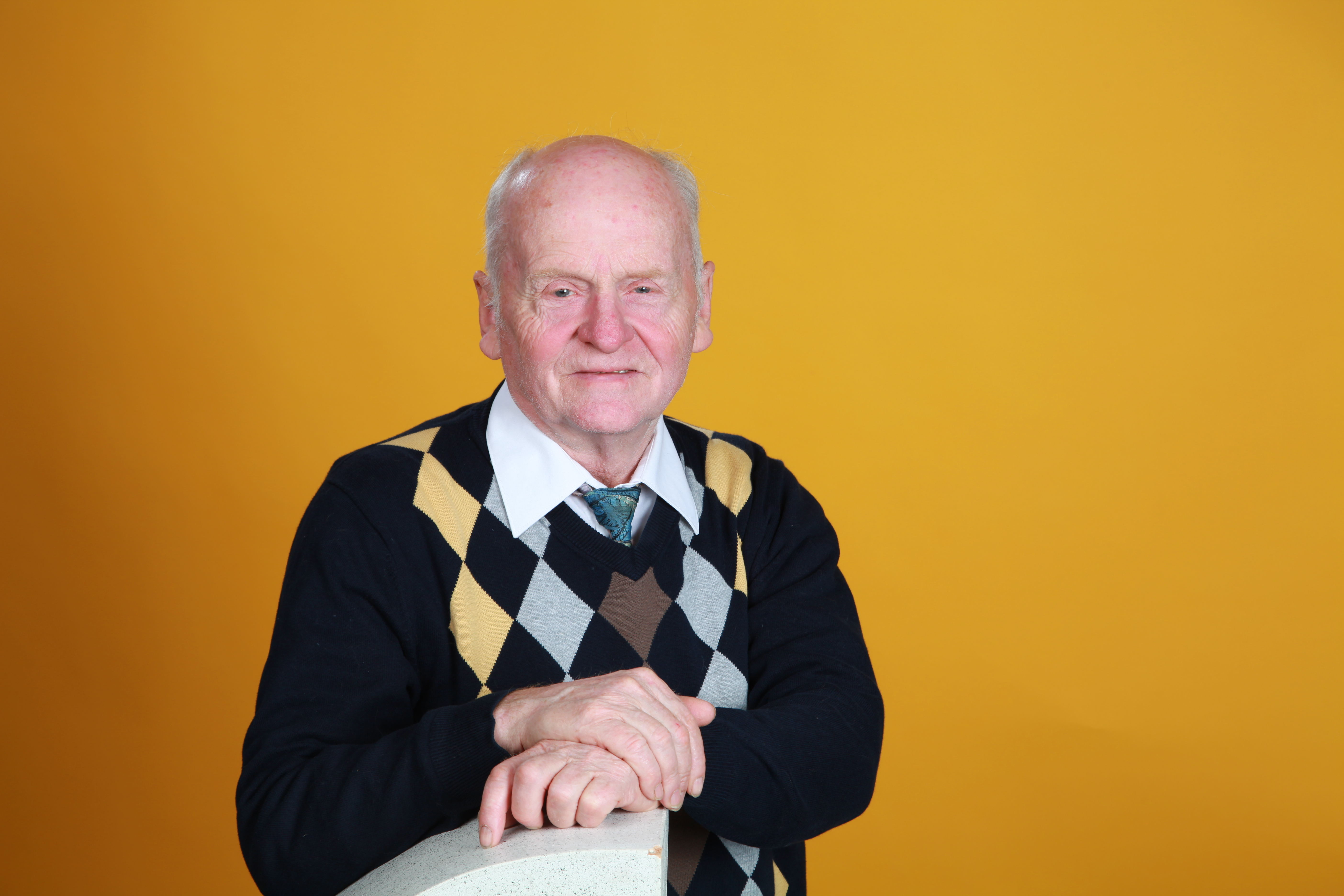 Manfred Dott, Bundestagskandidat der Piratenpartei (2013)